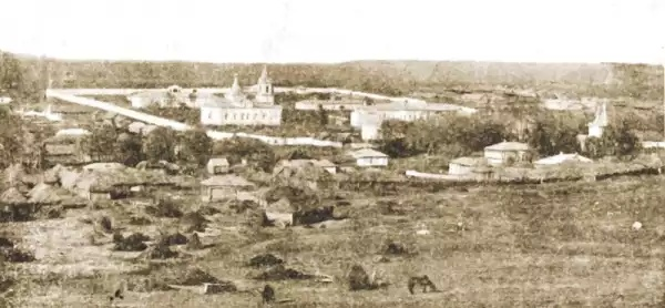 Общий вид Ключегорского Казанско-Богородицкого монастыря, Бузулукский уезд Самарской губернии